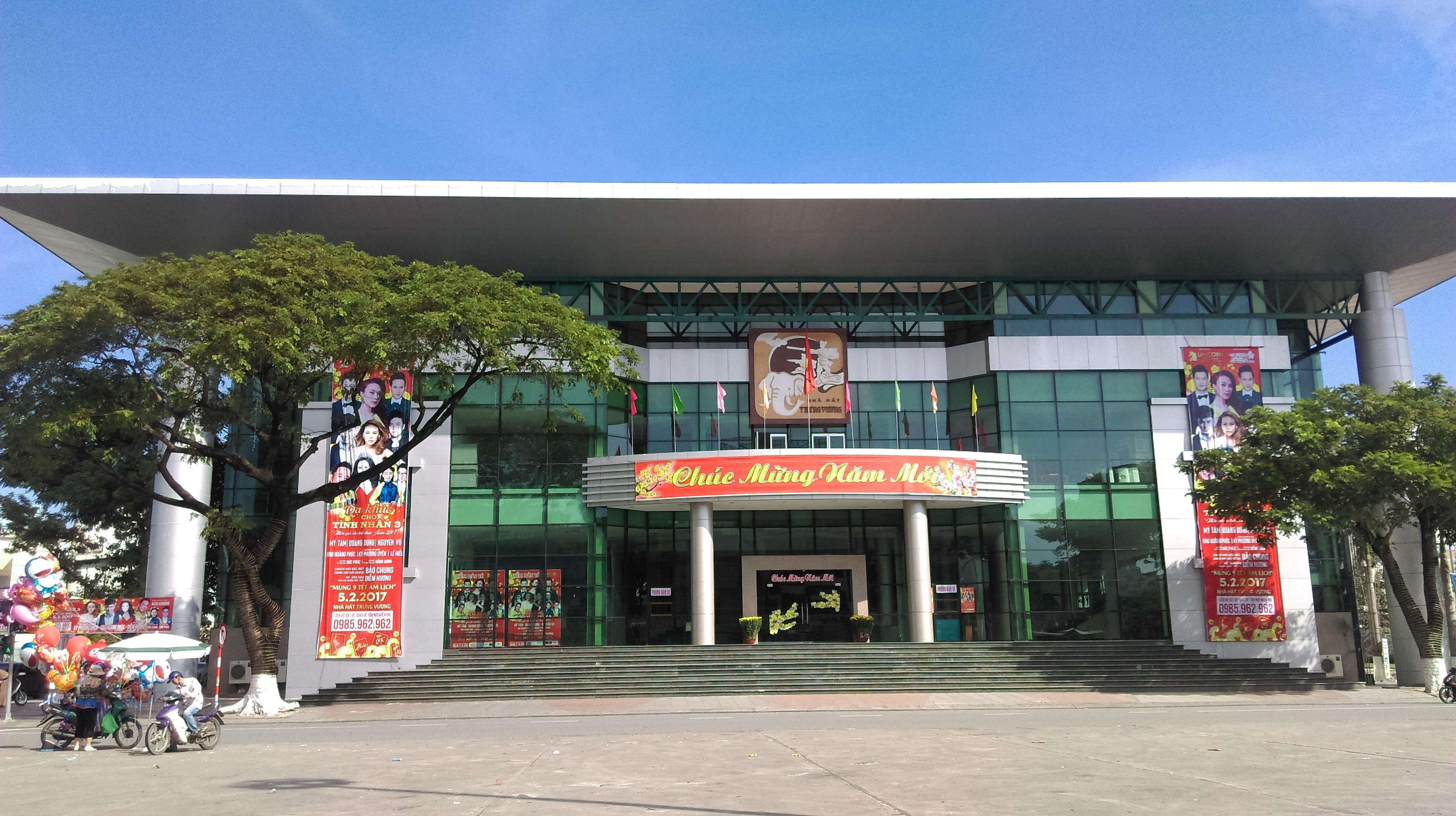 Nhà hát Trưng Vương